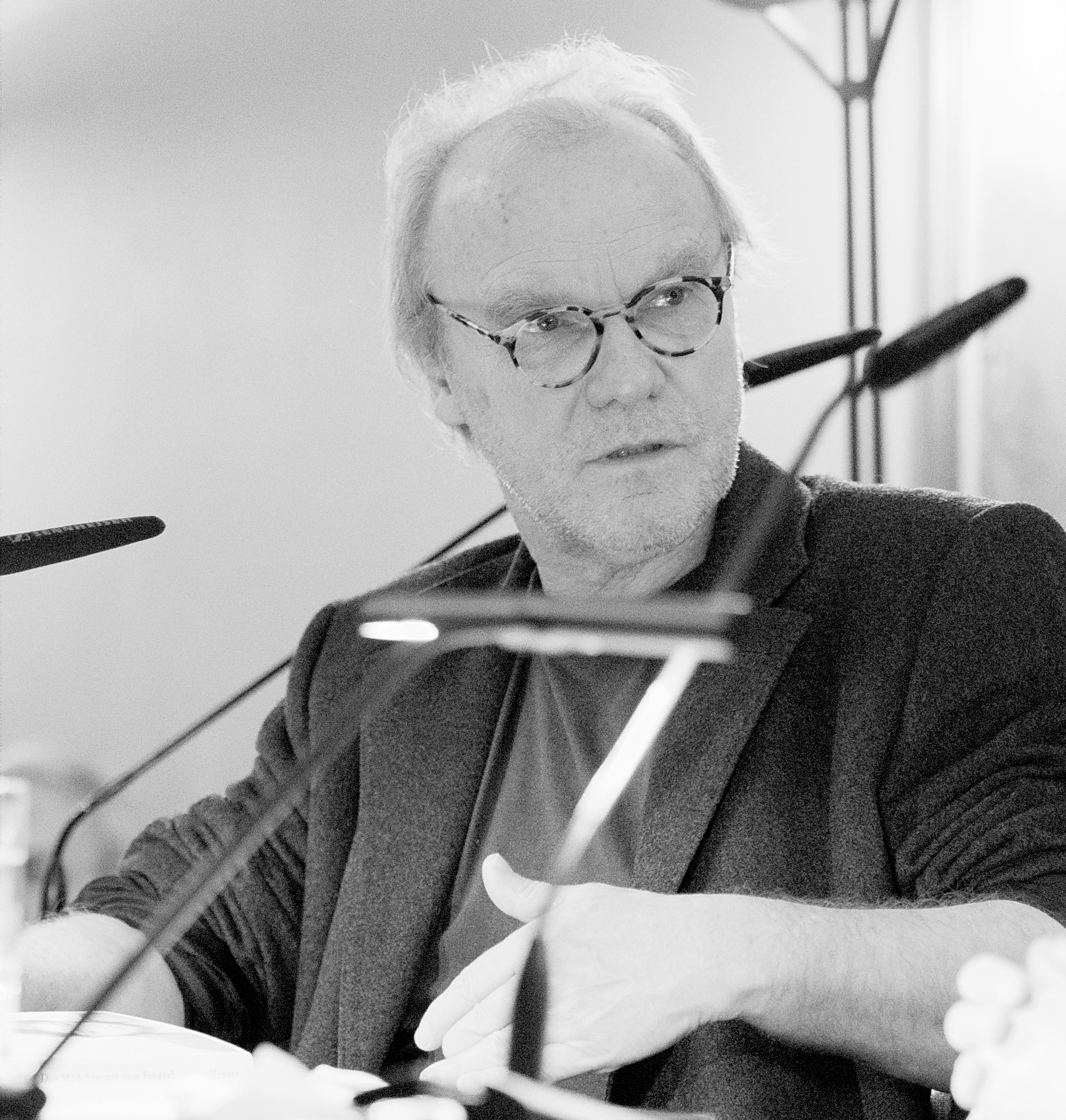 Michael Köhlmeier im Literaturhaus Hamburg, 22.3.2016